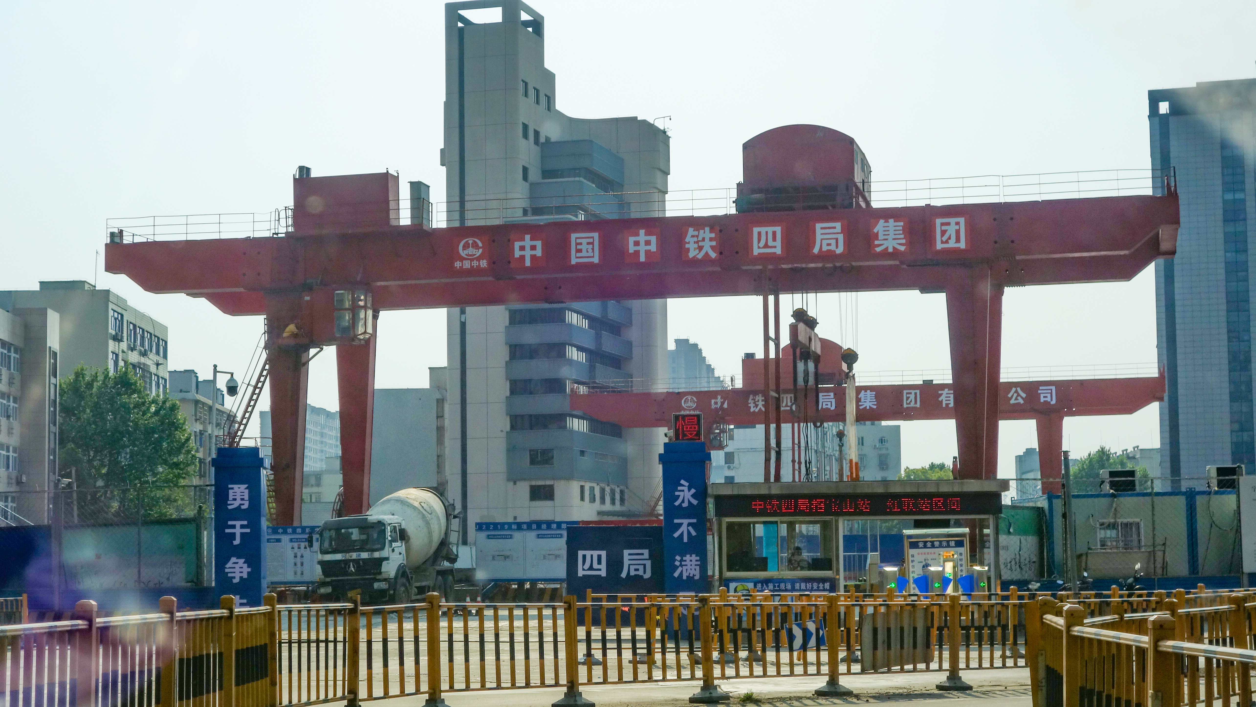 宁波轨道交通招宝山站